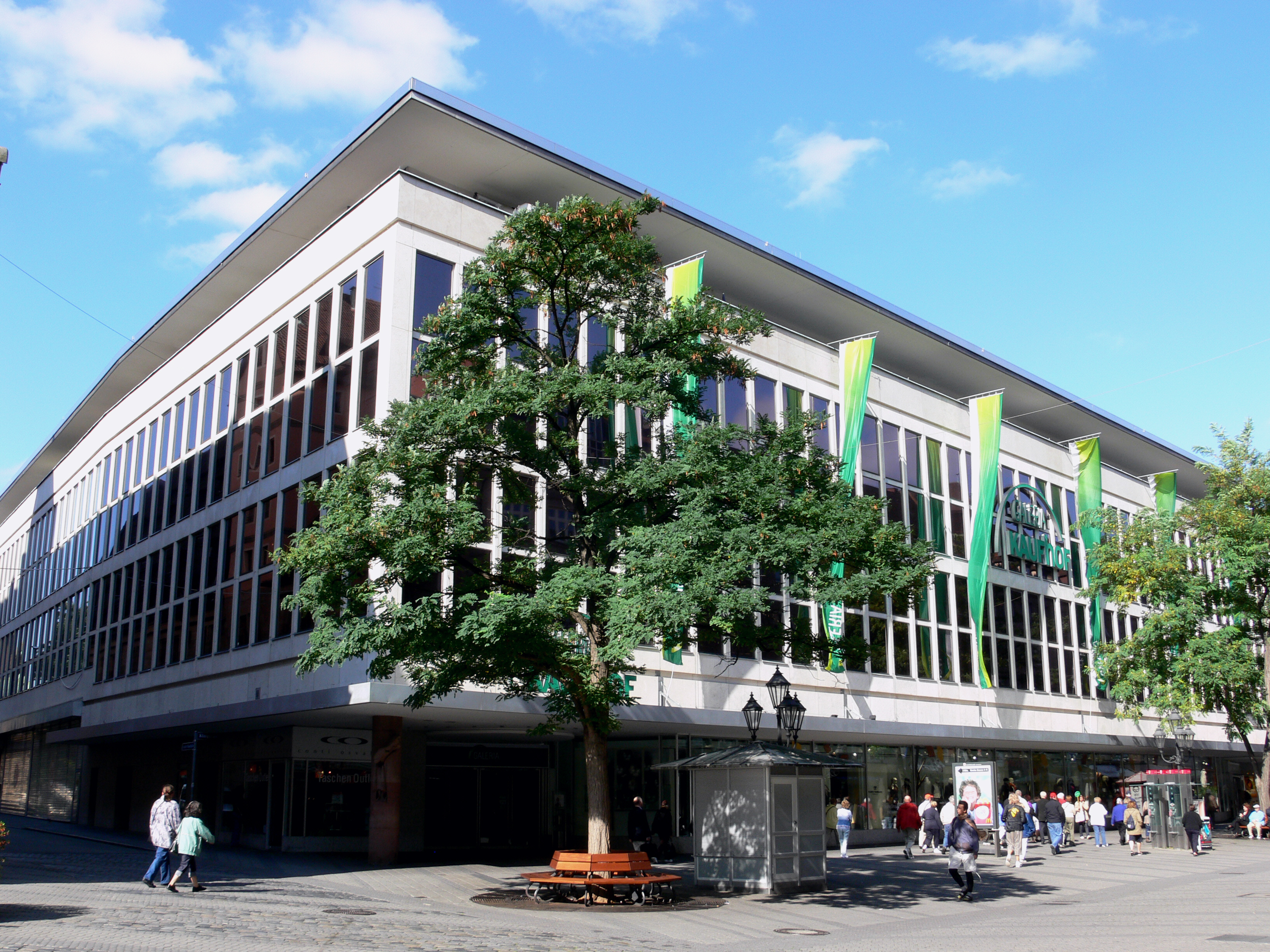 Nürnberg, Kaufhof (Königstraße 50), erbaut 1950 nach Plänen von Hans Reichel, 1960-1962 stark verändert nach Plänen von Herbert Lochmann